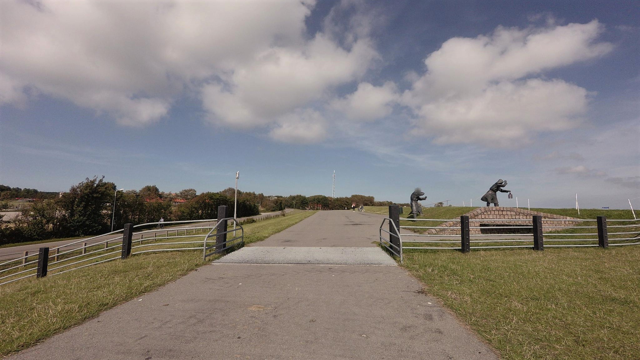 Ameland , De Dijkwachters, Ballumerbocht, Reeweg